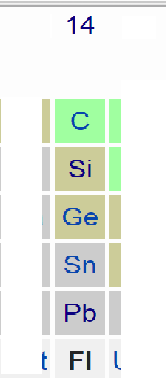 Көміртек топшасы